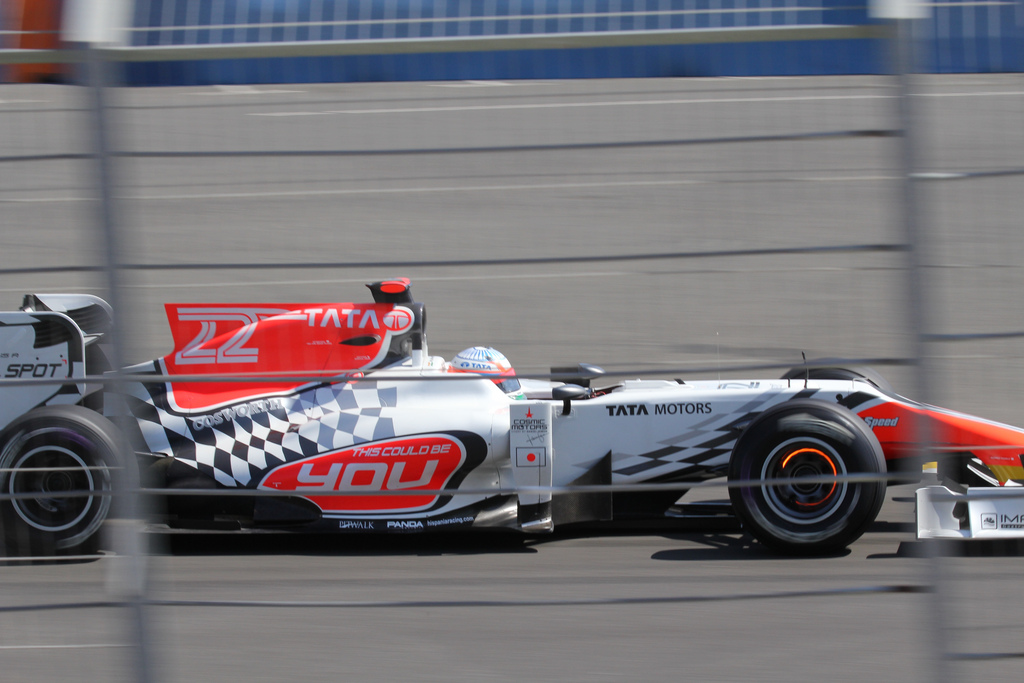 Нараин Картикеян, квалификация, Гран-при Европы, Валенсия, 2011 год